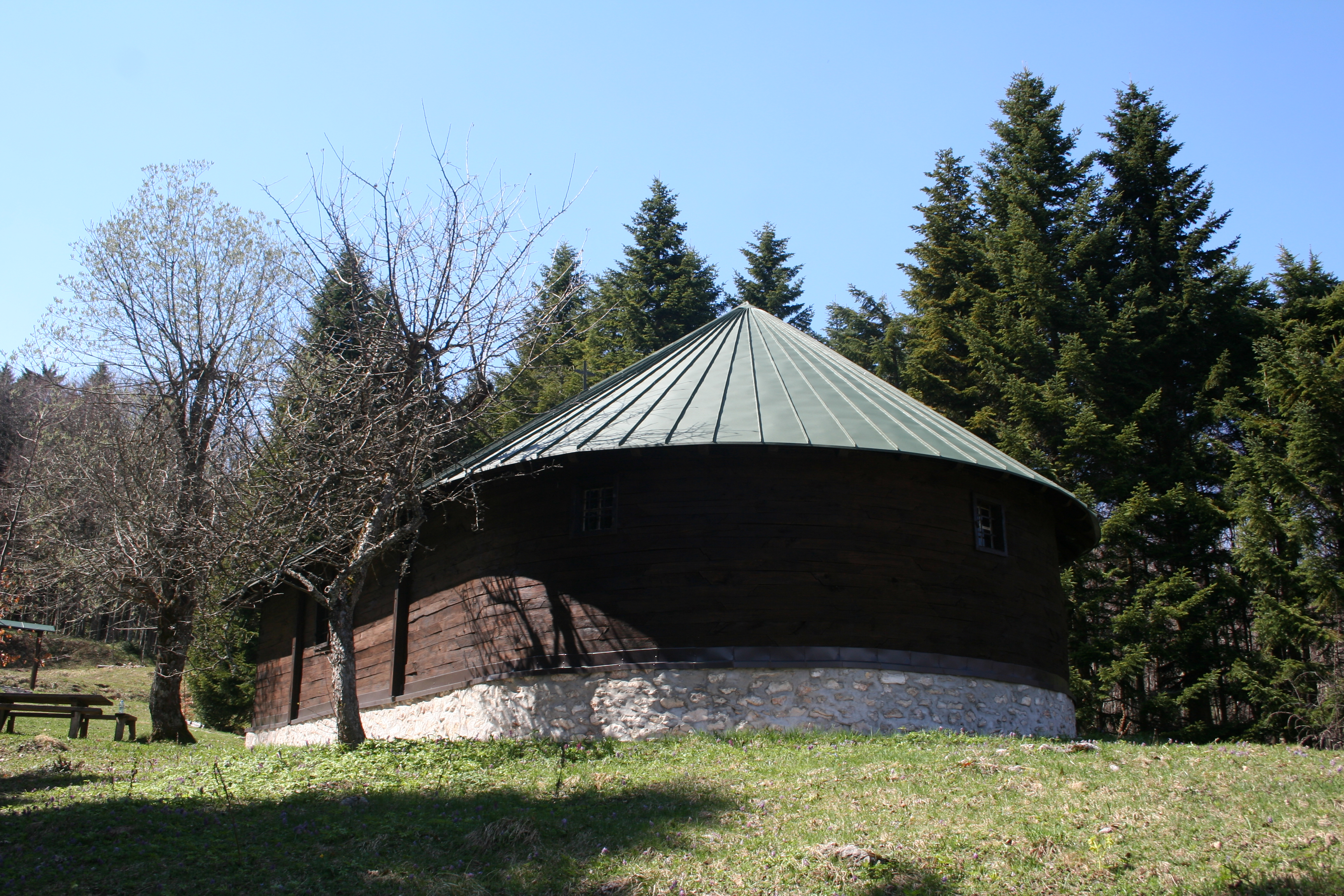 Crkva brvnara na Bobiji